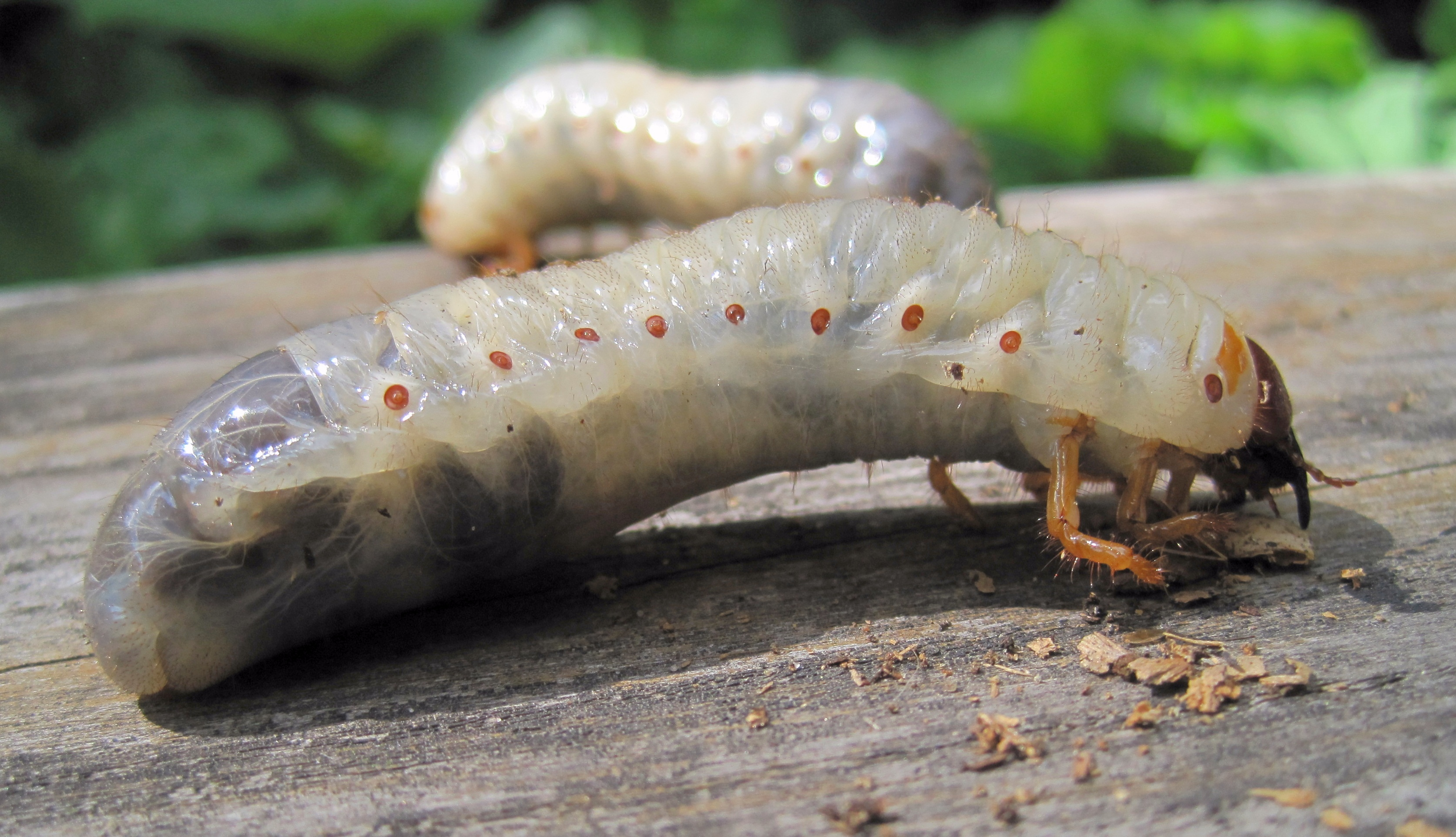 Zwei sehr große Larven des Polyphylla fullo.